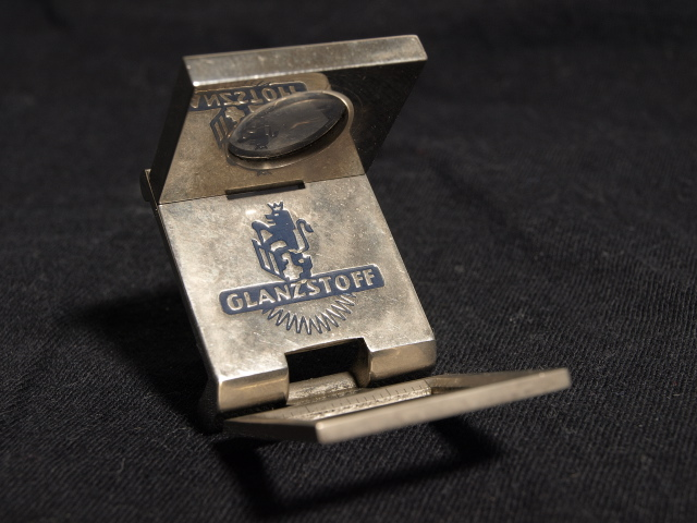 Ein „Fadenzähler", Klapplupe mit dem Logo der Vereinigten Glanzstoff Fabriken